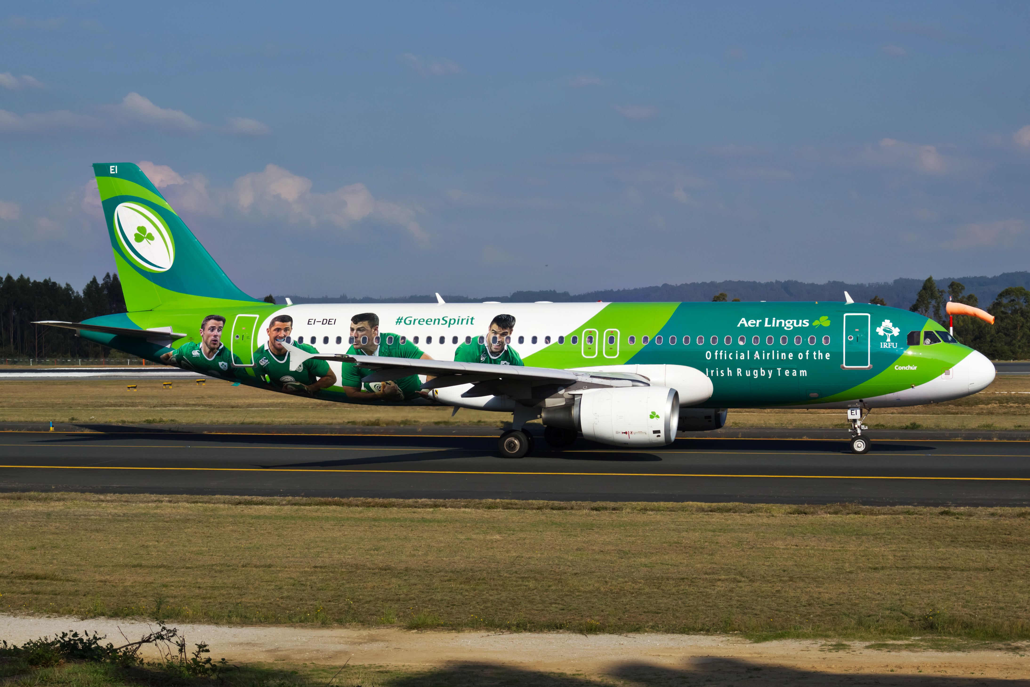 Airbus A320 de Aer Lingus no aeroporto de Santiago de Compostela.